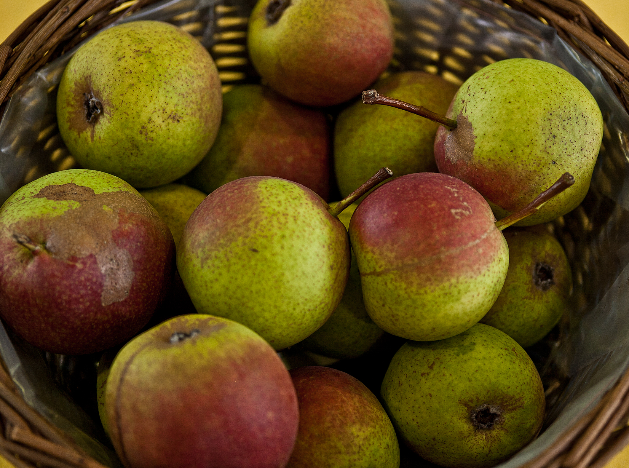 Die Doppelte Philippsbirne ist eine Birnensorte